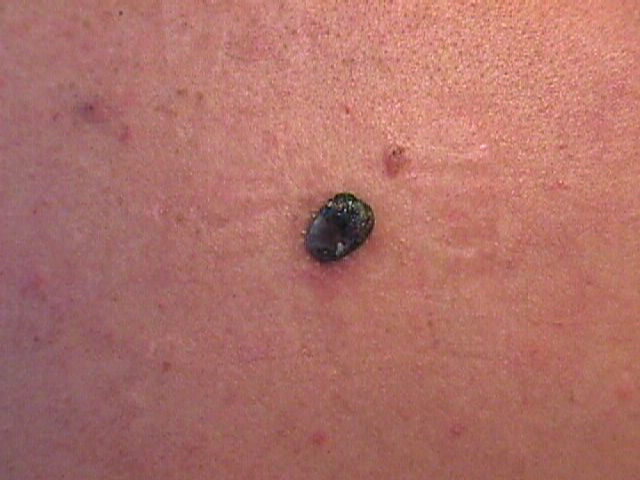 Hier sieht man ein bösartiges Melanom.